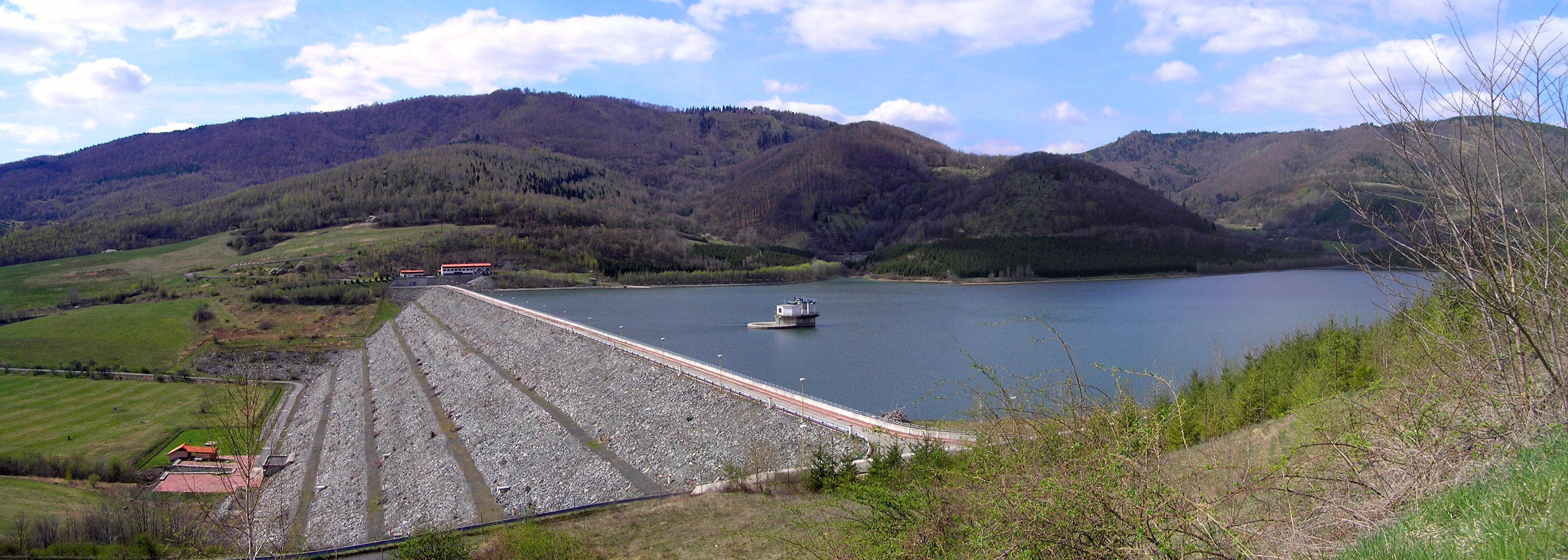 Málinec - vodná nádrž